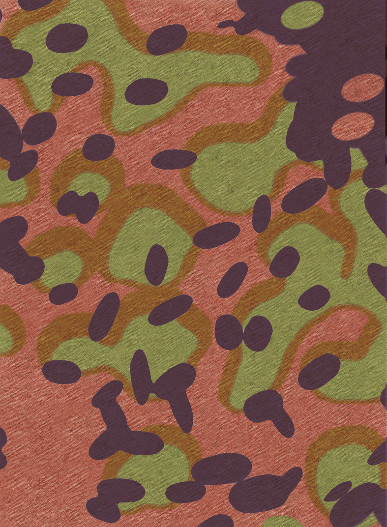 Platanenmuster der Waffen-SS – SommerfarbeCropped caption:Platanenmuster – SommerfarbeDas deutsche Platanenmuster ist das ältesteFlecktarn der Welt und wurde zwischen1937 bis 1942 hergestellt.